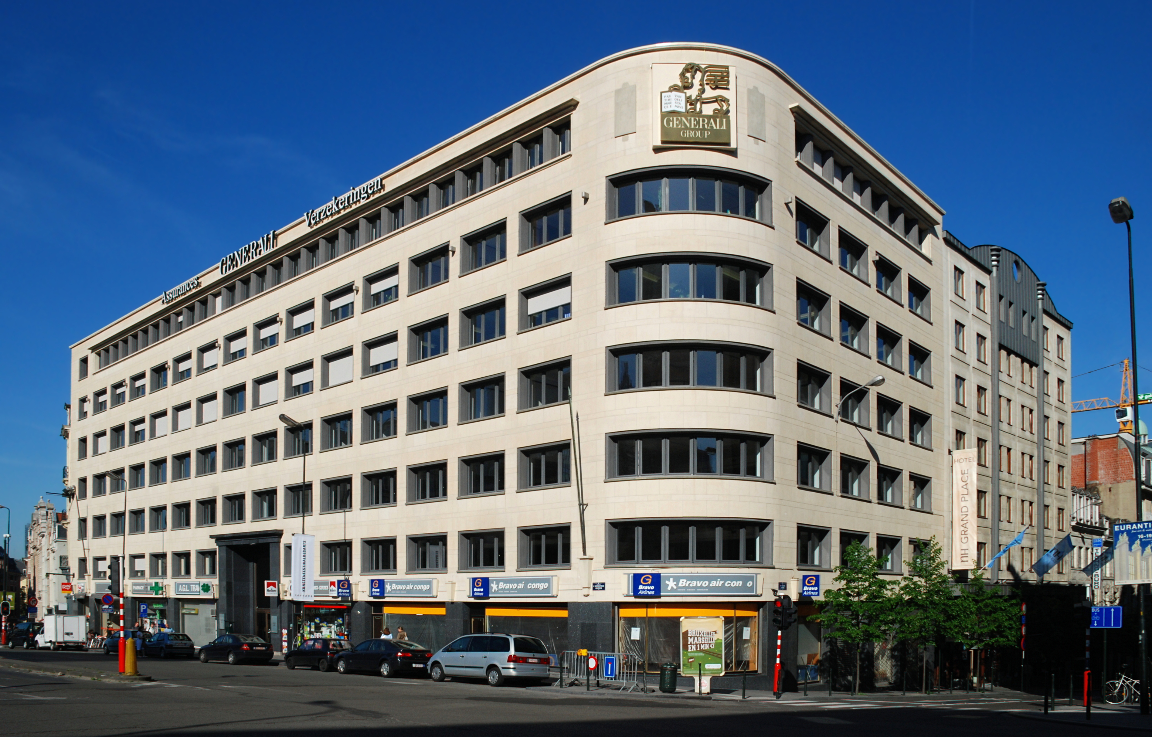 Belgique - Bruxelles - Ancien siège de la compagnie d'assurances « De Nederlanden » boulevard de l'Impératrice 60-72 (Architecture monumentale en Belgique - architectes Philippe Dumont et Georges Riquier - 1956)